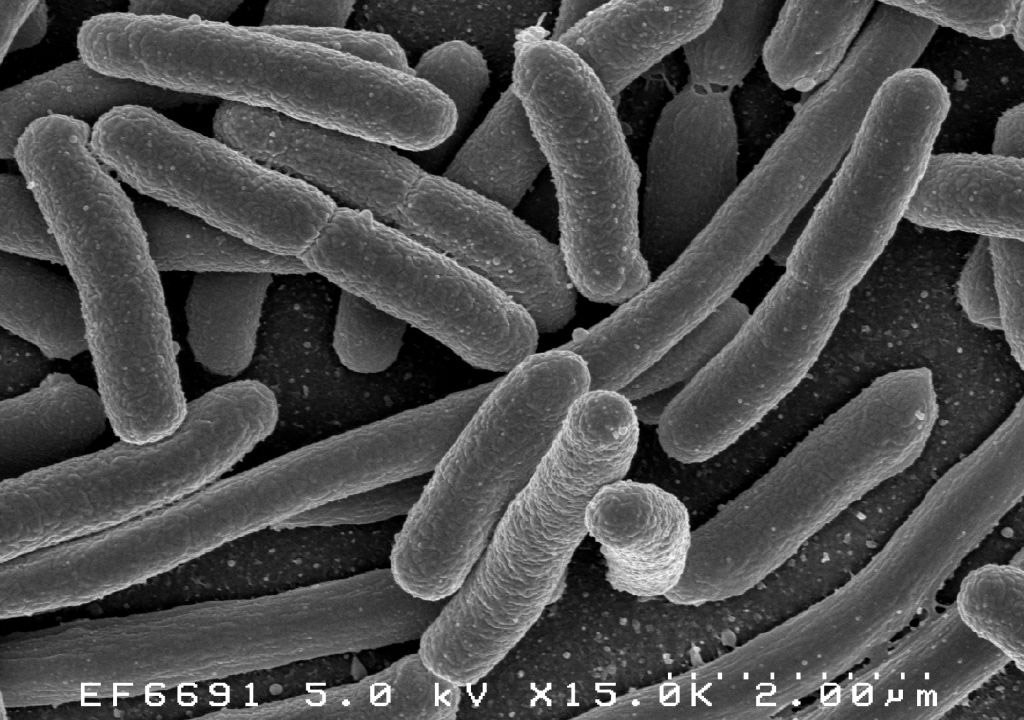 E. coli (microscopie électronique à balayage)